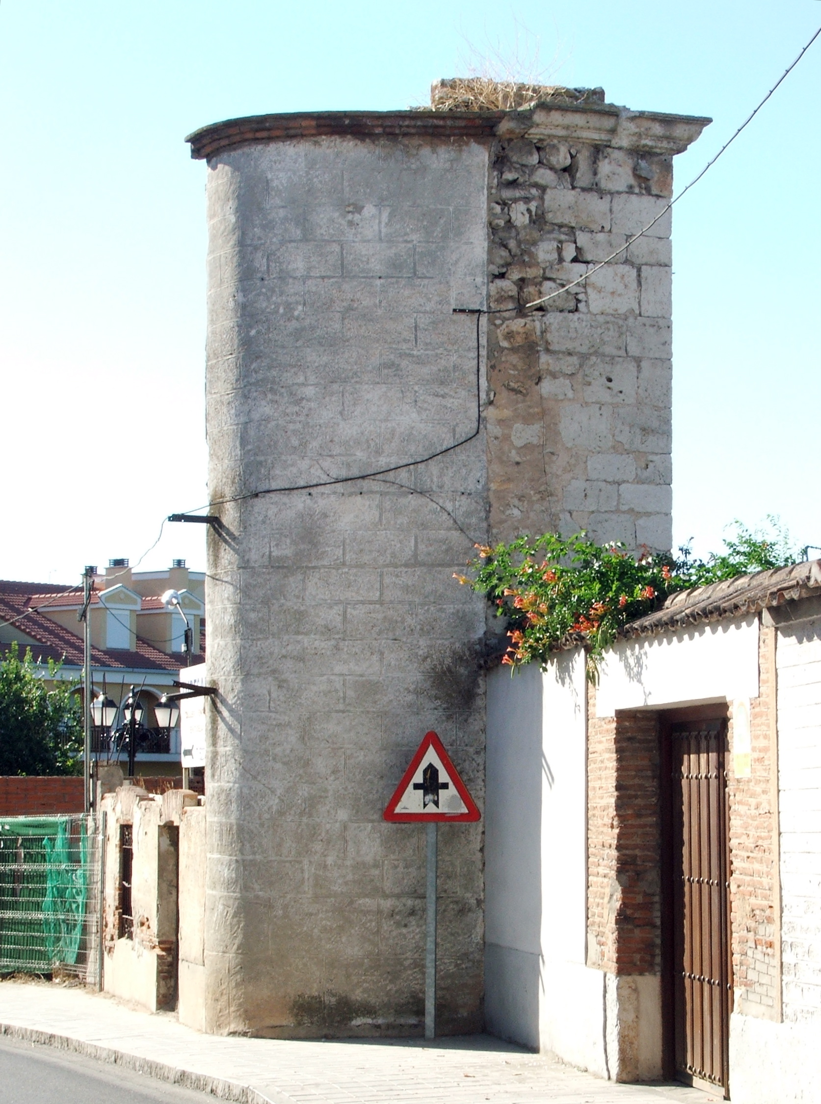 Los últimos restos de la Puerta de Tudela de Duero